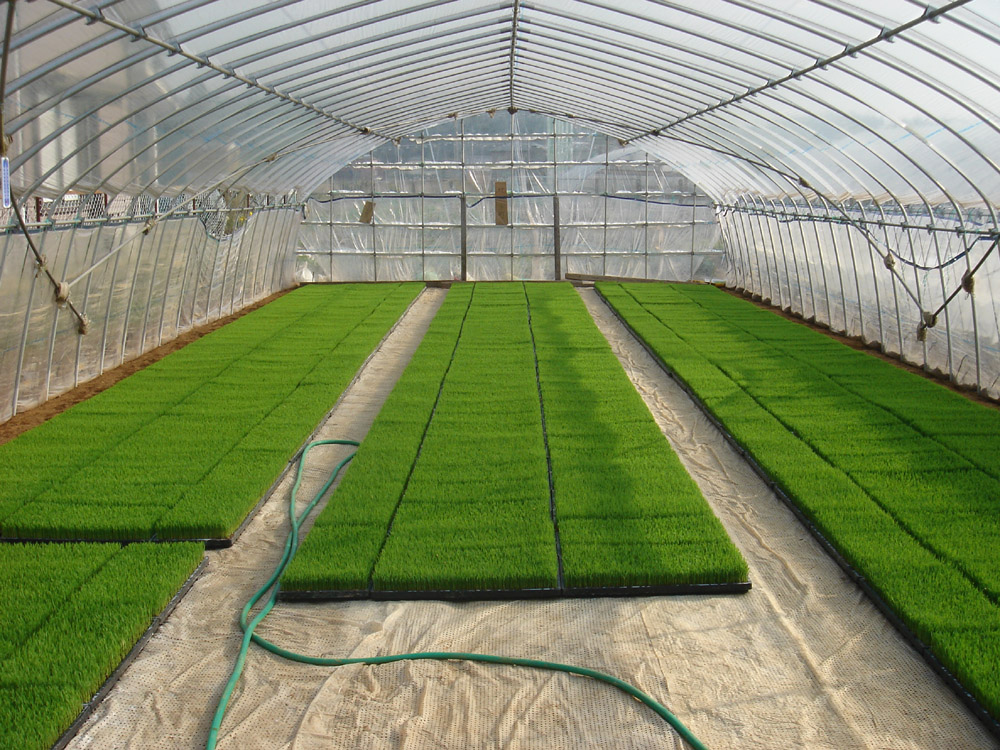 Sod greenhouse interiorSod Greenhouse